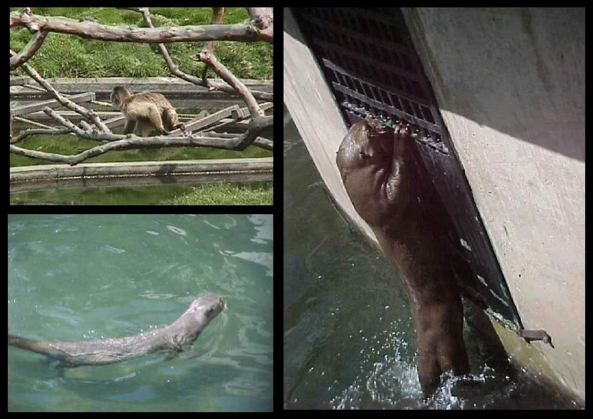 Mamiferos del Parque Generalisimo Francisco de Miranda Caracas - Venezuela